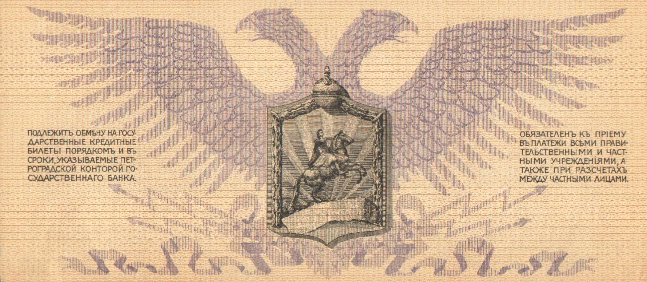 1000 рублей. Кредитный билет полевого казначейства северо-западного фронта. Подпись Юденича. Реверс.